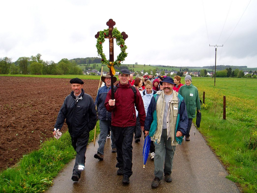 Spitze der Fußpilgergruppe 2005 der St. Matthias Bruderschaft Büttgen